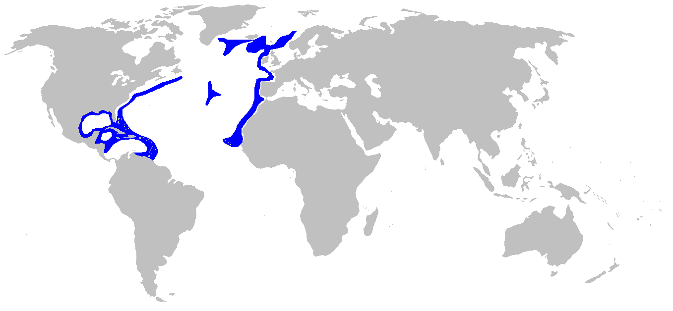 Distribution map for Apristurus laurussonii